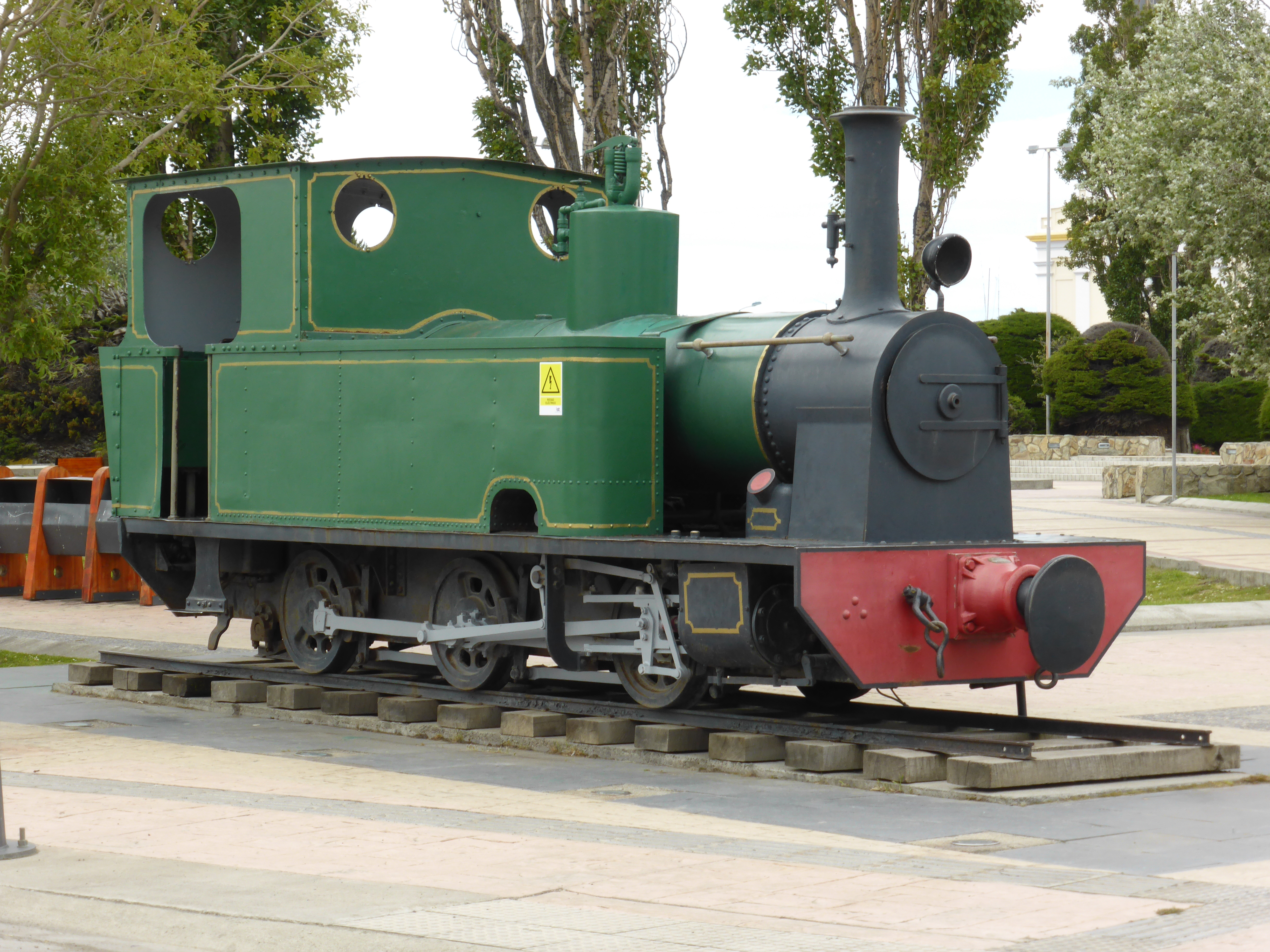 Locomotora de vapor fabricada por "Avonside Engine Company", en Bristol, Inglaterra, en el año 1920. Era utilizada por la "Sociedad Explotadora de Tierra del Fuego. Frigorífico de Puerto Bories", para trasladar al personal desde la localidad de Puerto Natales hasta la fábrica (industria frigorífica) del muelle de Puerto Bories, en Magallanes, sur de Chile.